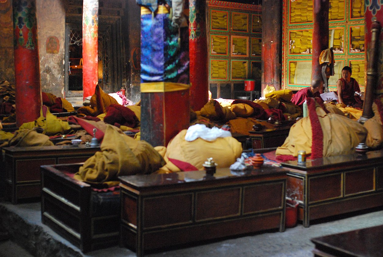 Shalu Kloster Tibet Innenansicht